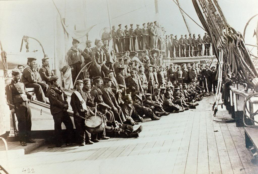 tripulacion del cochrane (1874)